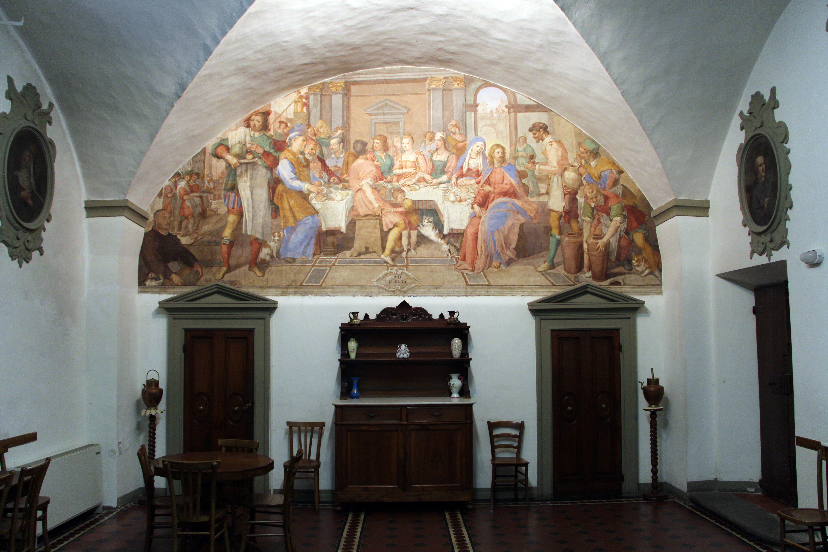 Bernardino poccetti, nozze di cana, 1604, 00.JPG